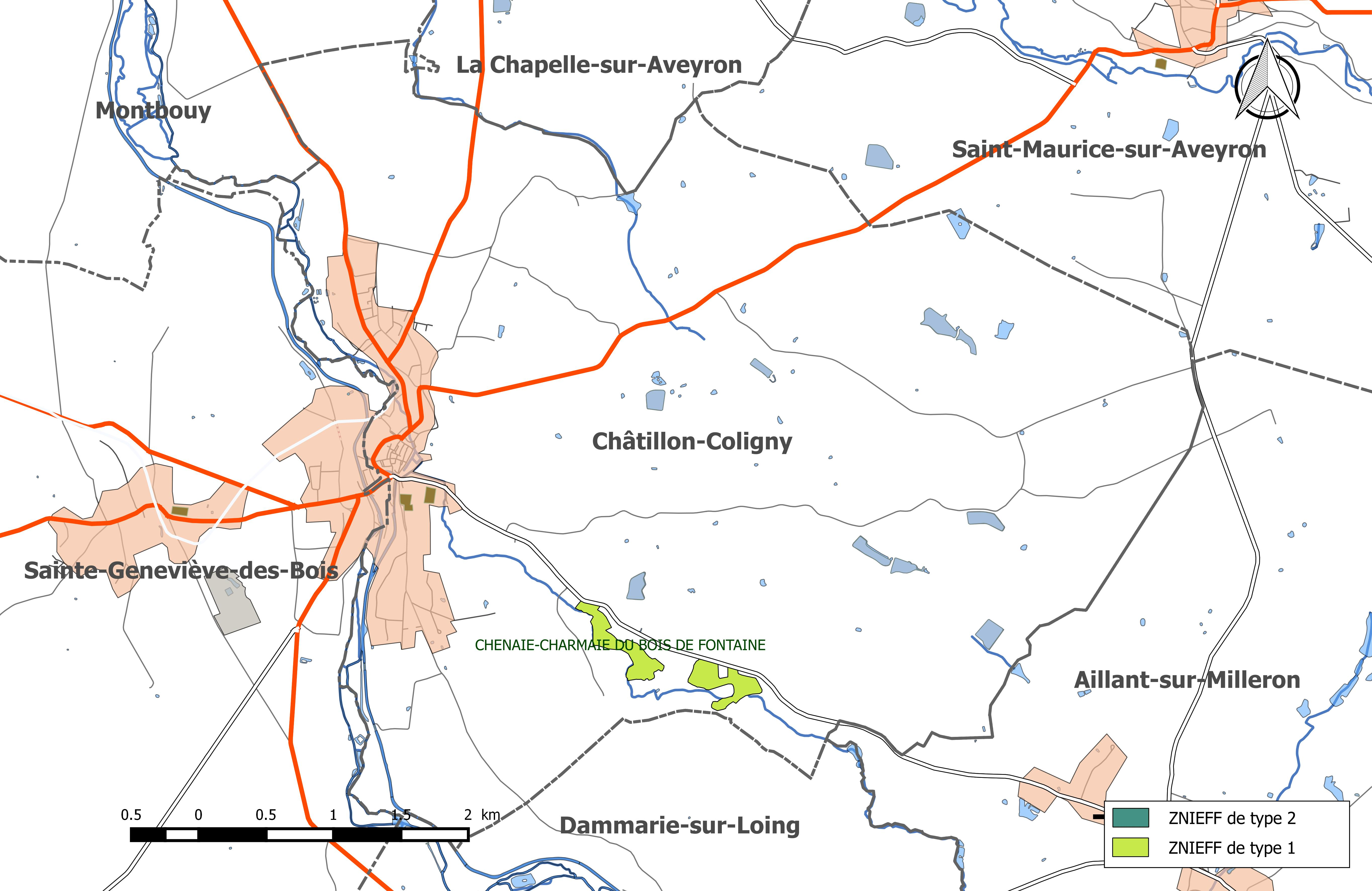 Carte des Zones naturelles d'intérêt écologique faunistique et Floristique (ZNIEFF) de la commune de Châtillon-Coligny.